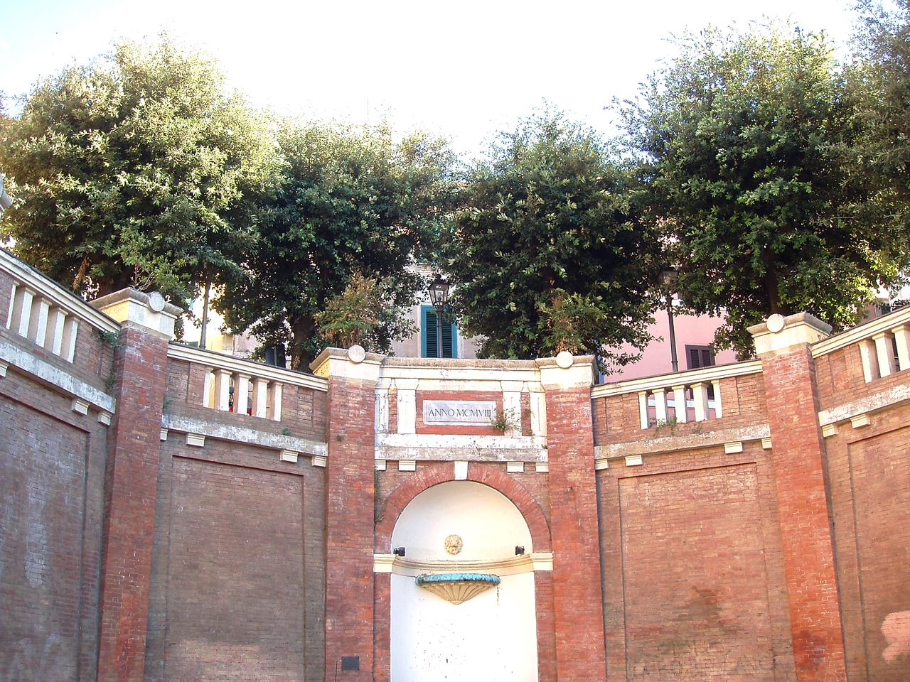 il cosiddetto "Pincetto" di Monterotondo, piazza del Duomo, provincia di Roma.